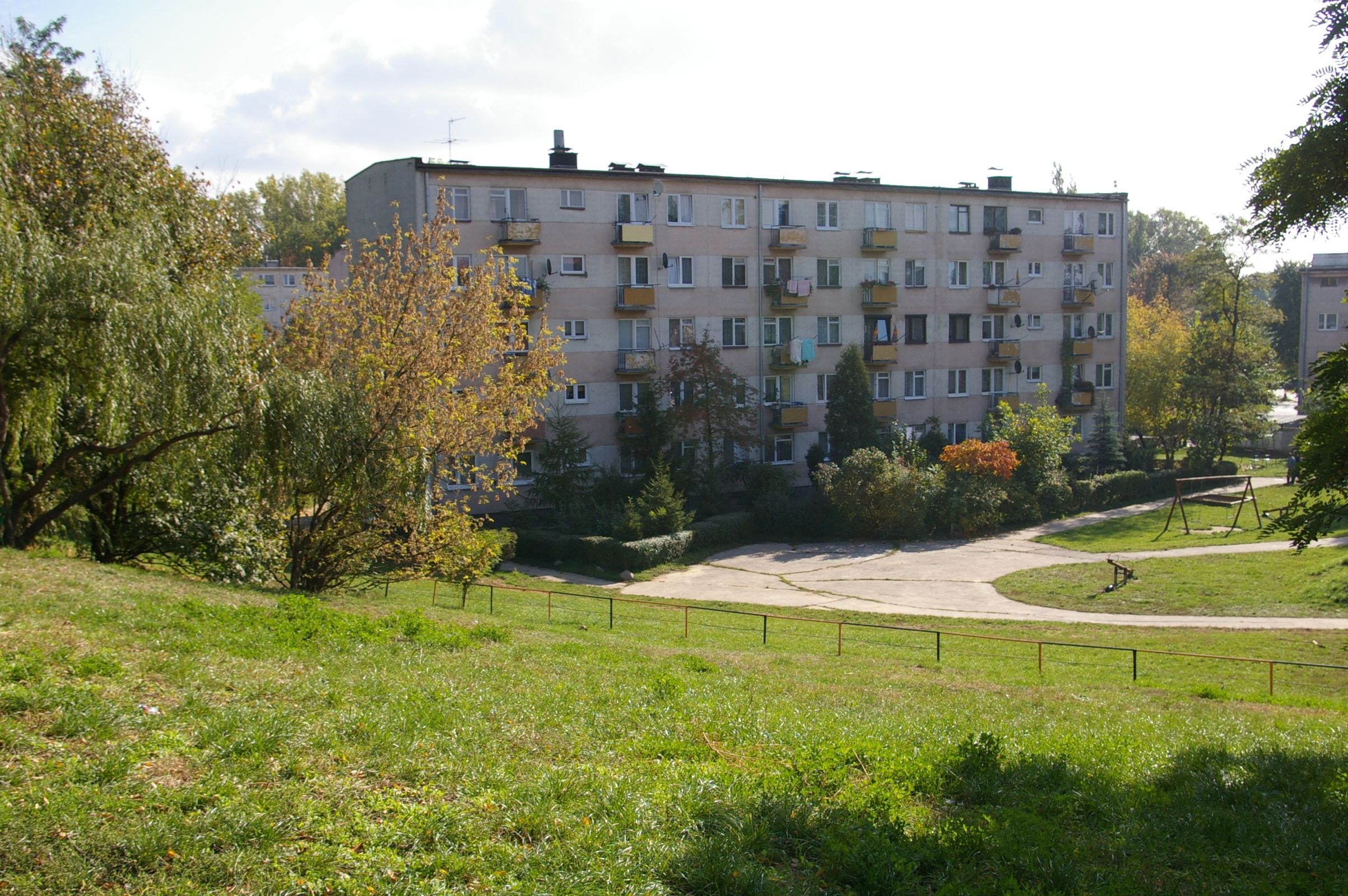 Bloki na osiedlu Trójkąt w Ostrowcu Świętokrzyskim